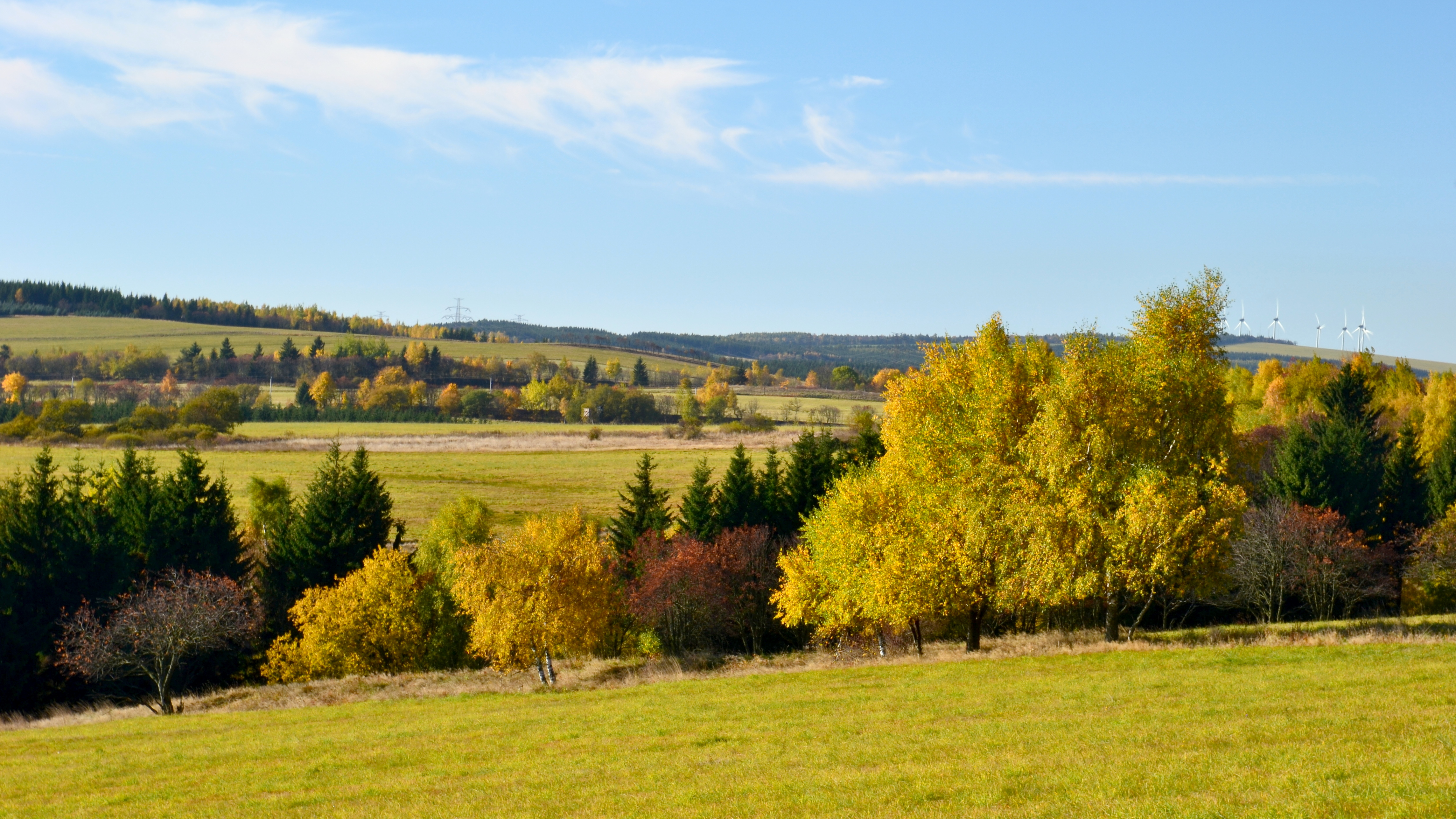 Přírodní park Bezručovo údolí - krajina pod Menhartickým vrchem